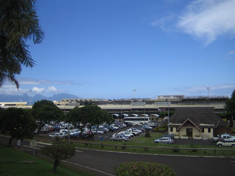 Der internationale Flughafen von Tahiti Faa'a